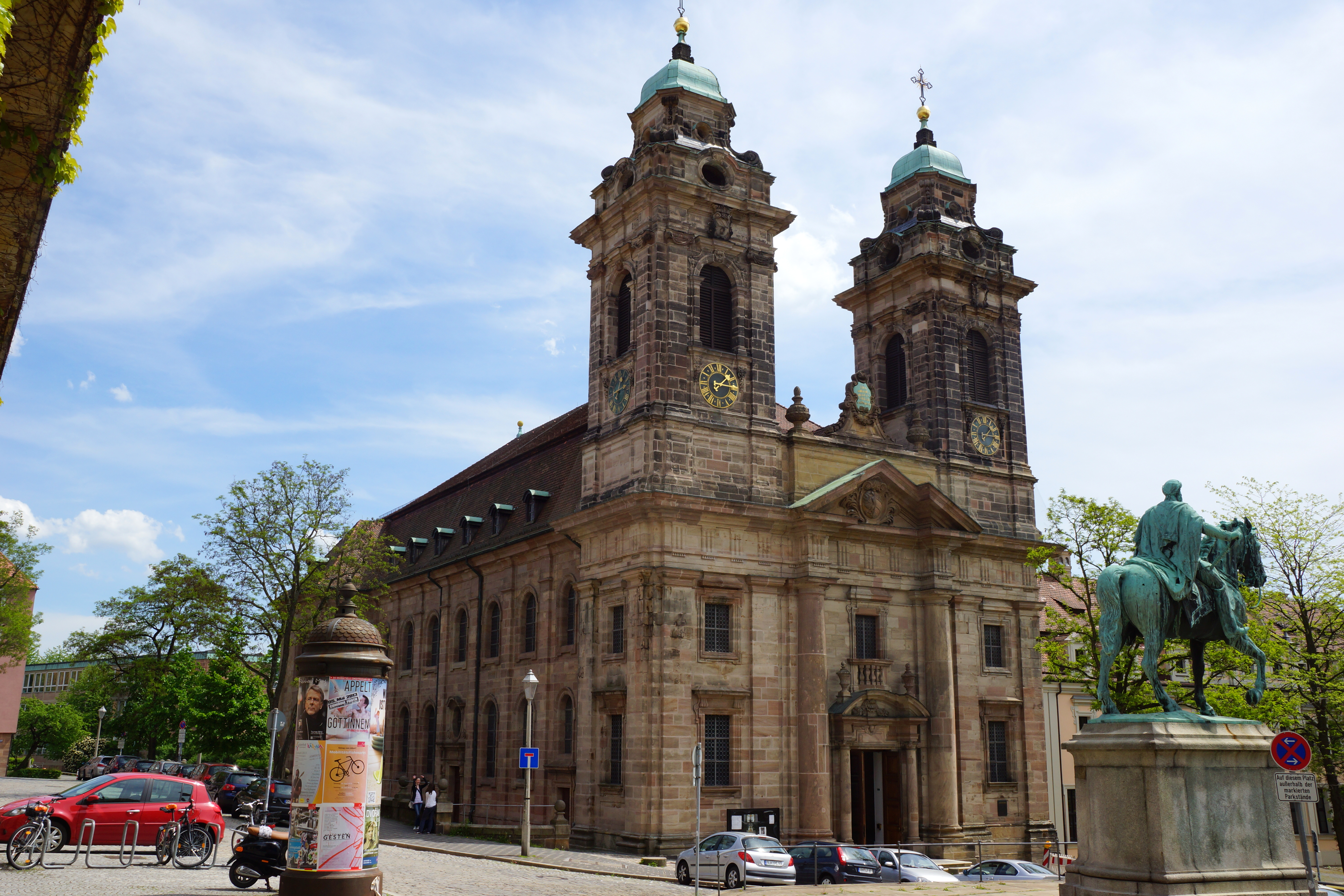 St. Egidien / Egidienkirche in Nürnberg